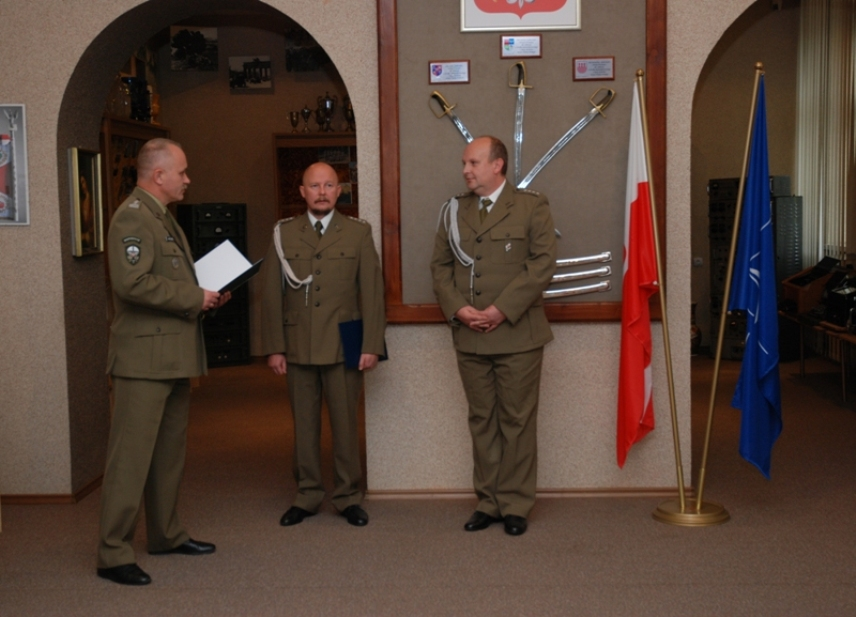 Garnizon Przasnysz, 2011r. Pożegnanie żołnierzy zawodowych przez dowódcę JW 5699 płk Ryszarda Wróbla